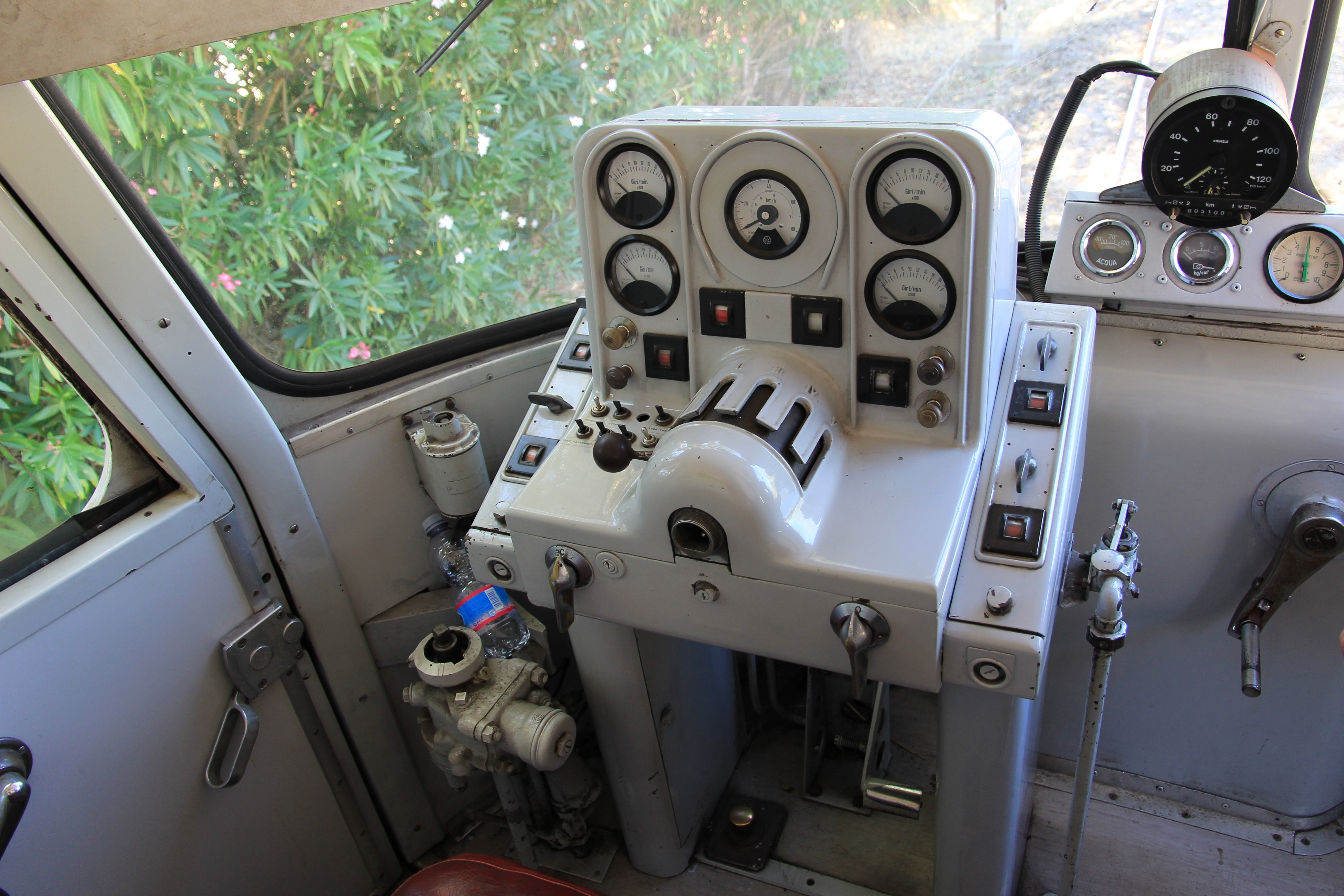 Automotrice ADm 51–61